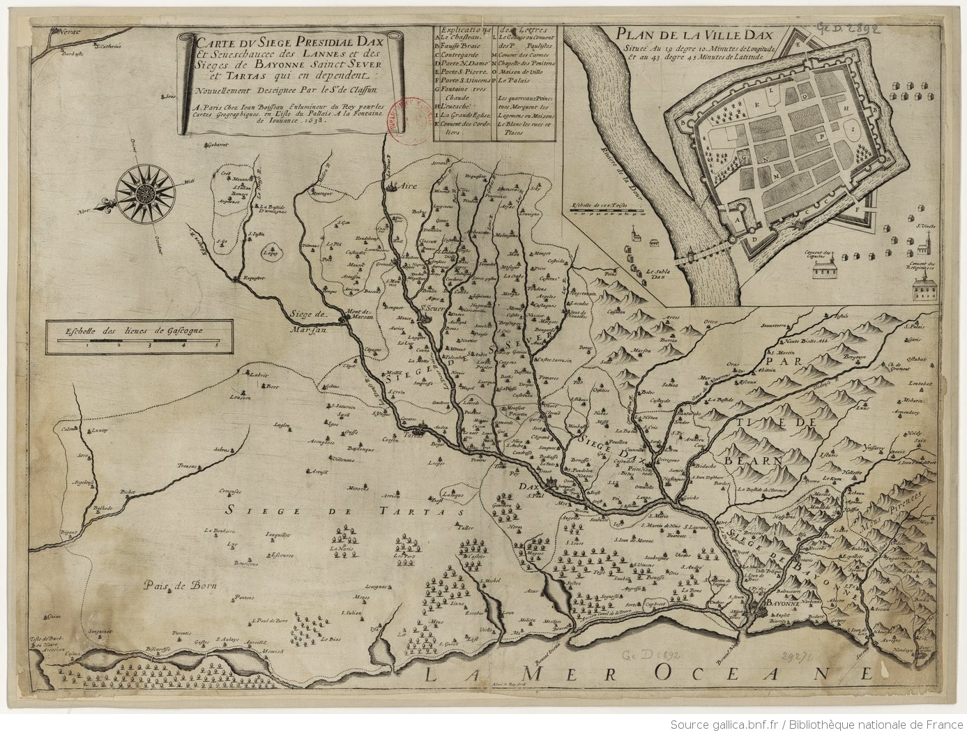 Carte du siège présidial de Dax et sénéchaussée des Landes et des sièges de Bayonne Saint-Sever et Tartas qui en dépendent, nouvellement dessinée par le Sieur de Classun